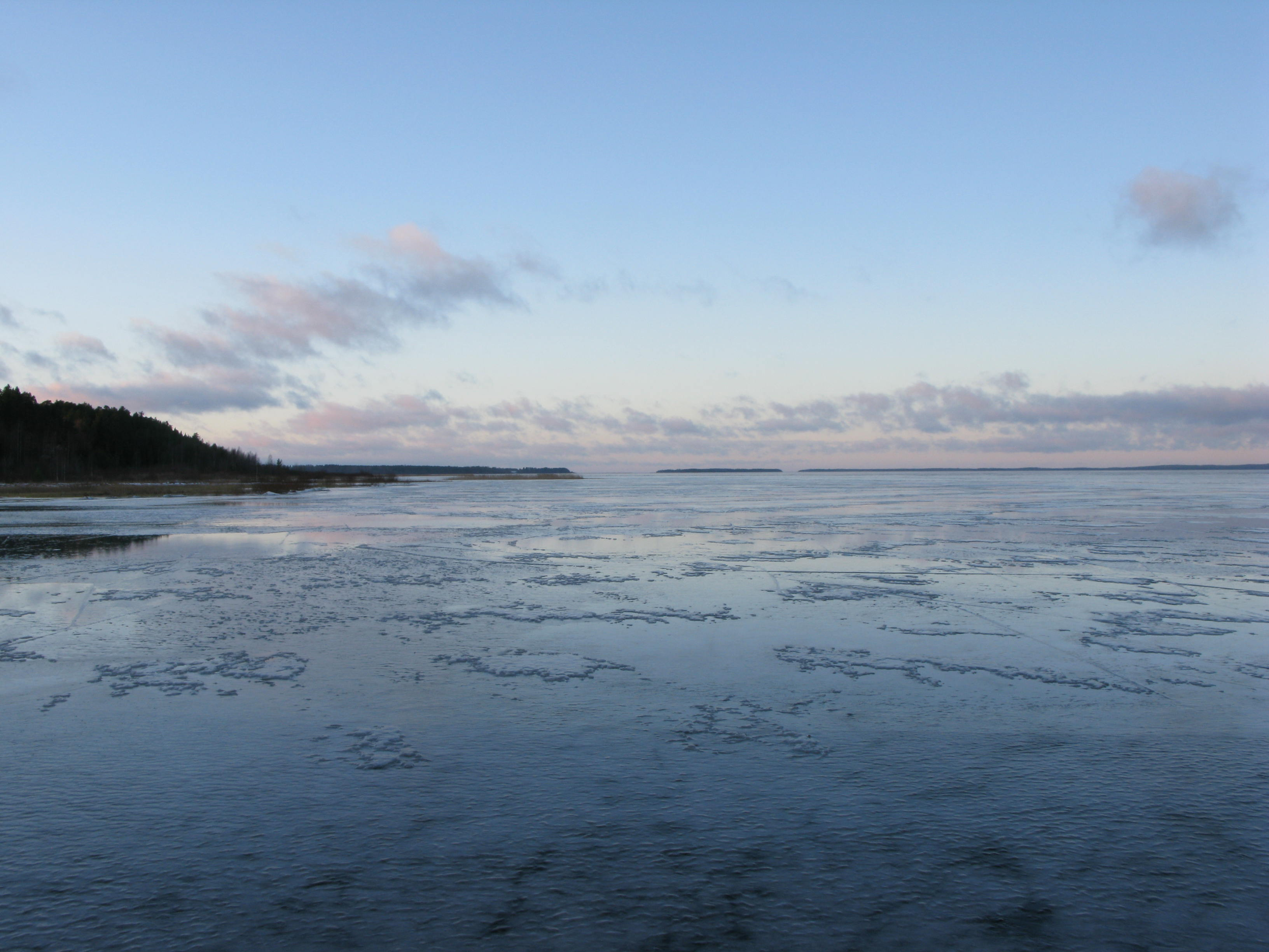 Oulujärven Paltaselkä talvella joulukuussa. Kuva otettu Paltaniemeltä länteen.